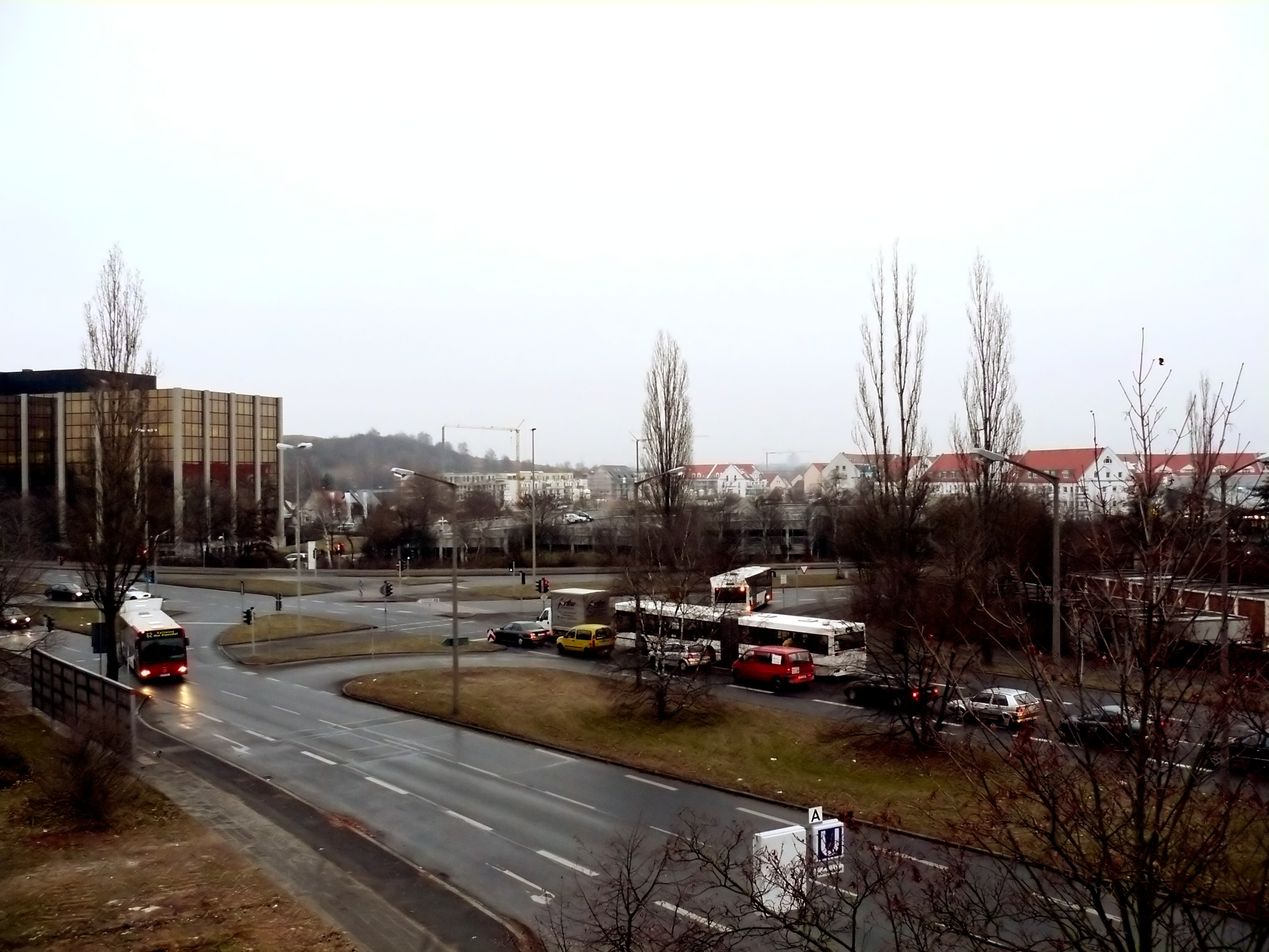 Im Nürnberger Stadtteil Röthenbach trennen sich am Ende der Schweinauer Straße (hinten) die Bundesstraßen 2 (Weißenburger Straße, rechts) und 14 (Ansbacher Straße, vorne)